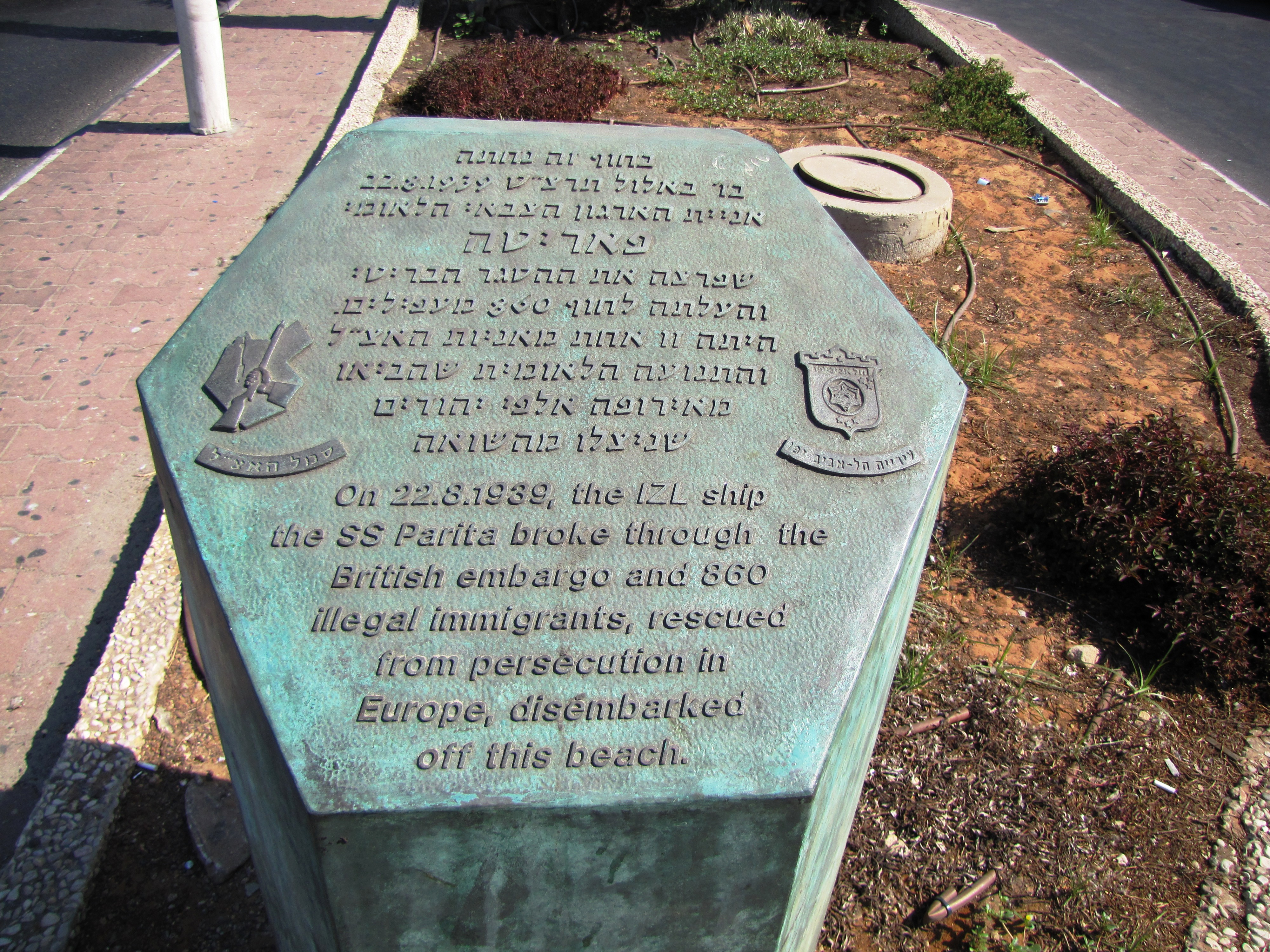 ציון זיכרון לנחיתת ספינת המעפילים פריטה בחוף תל אביב מול מלון דן